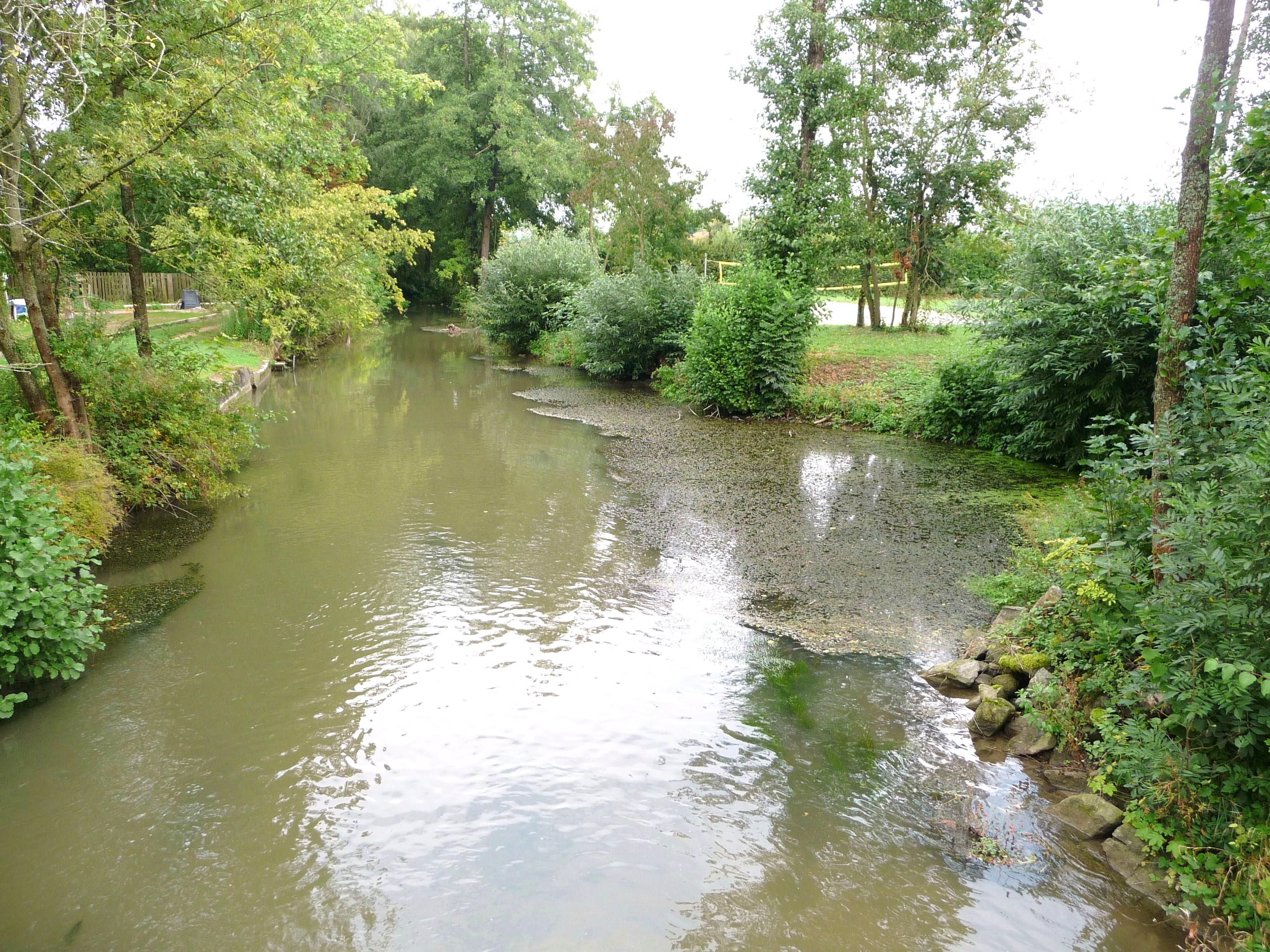 Die Große Laber in Sünching